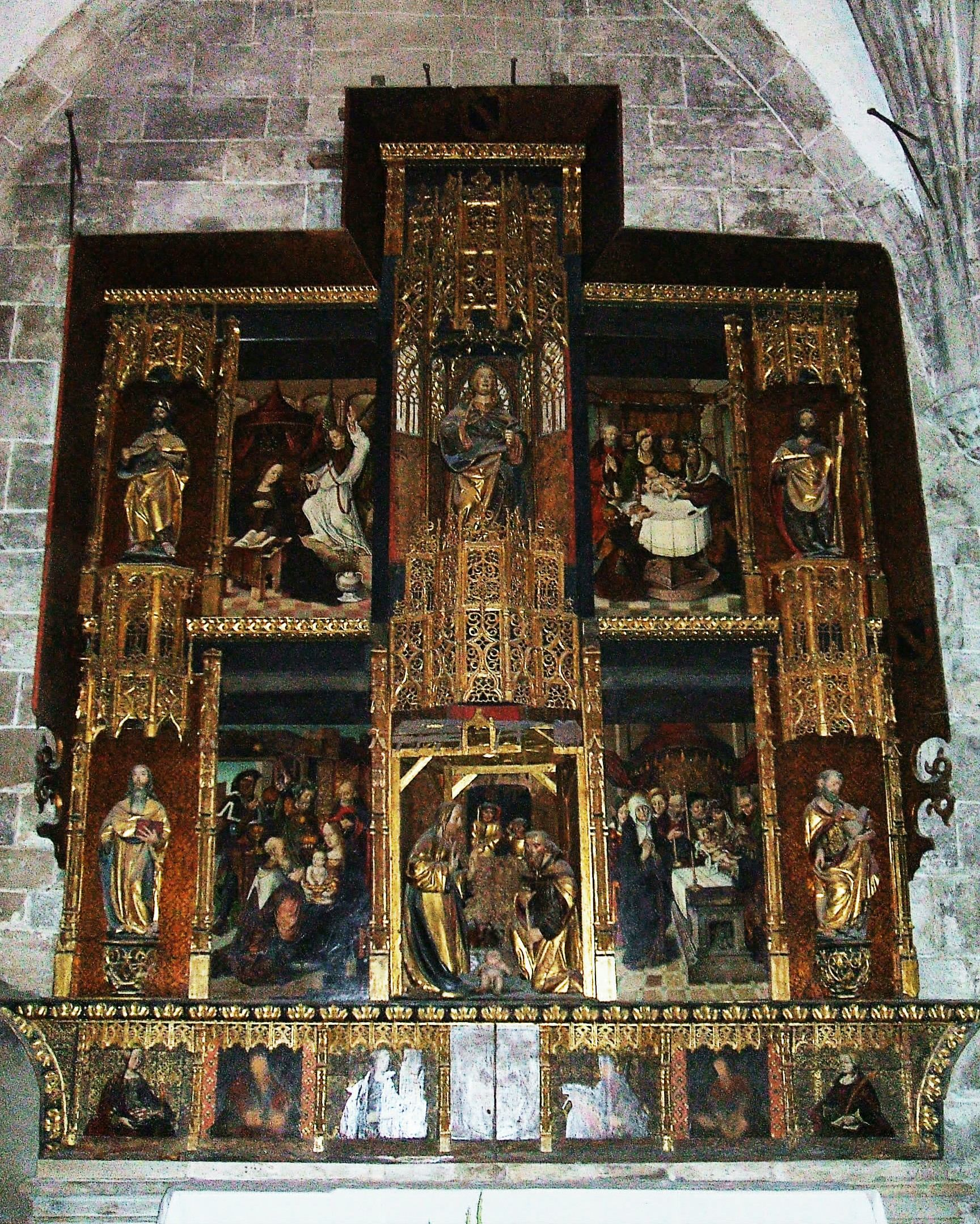 Retablo hispanoflamenco de (1490-1515) la Capilla de las Viejas de la Iglesia de San Martín, Briviesca, Burgos, España